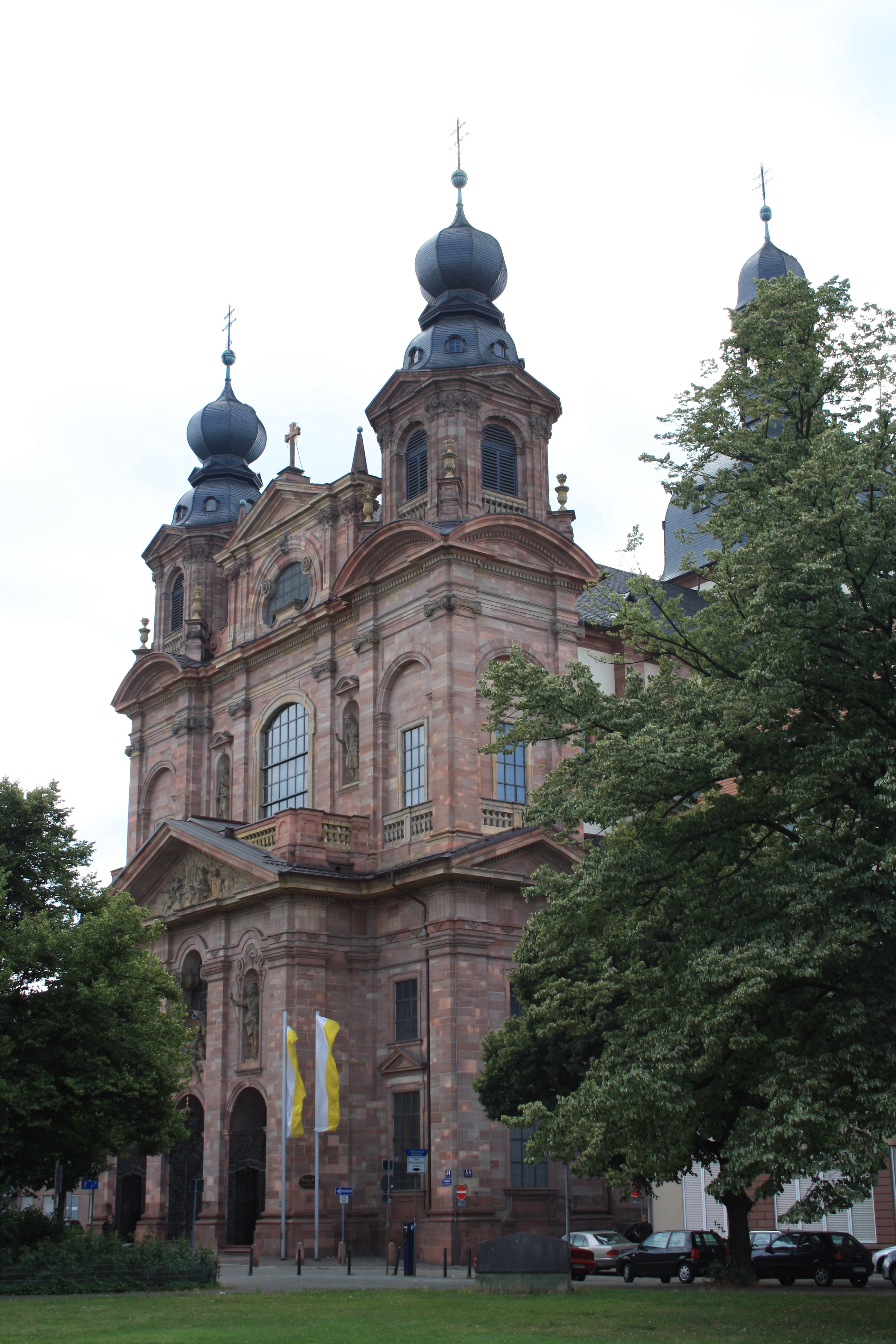 Frontansicht